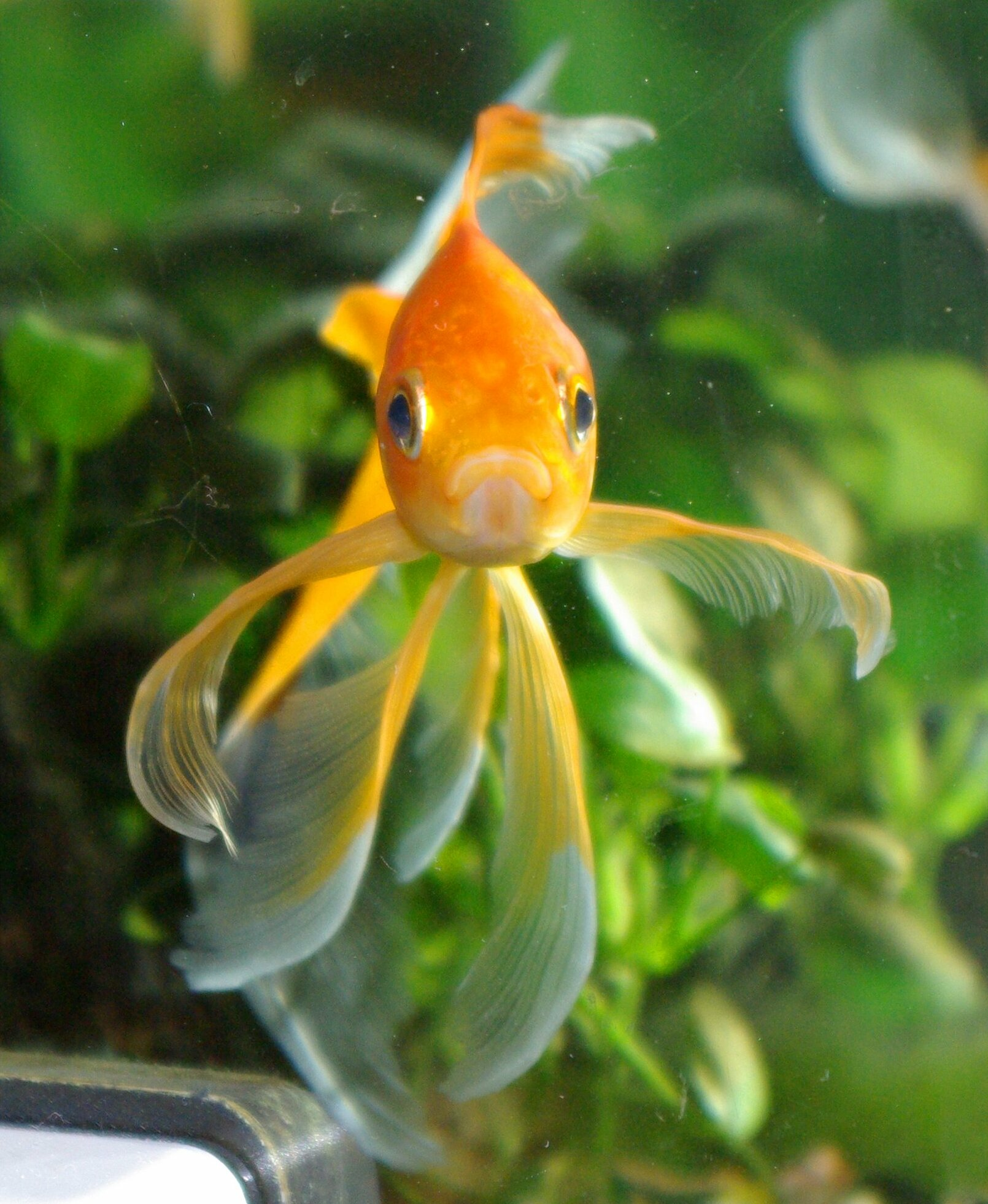 Dettagli Mia fotografia Soggetto pesce rosso cometa vista frontale Cometa gold fish